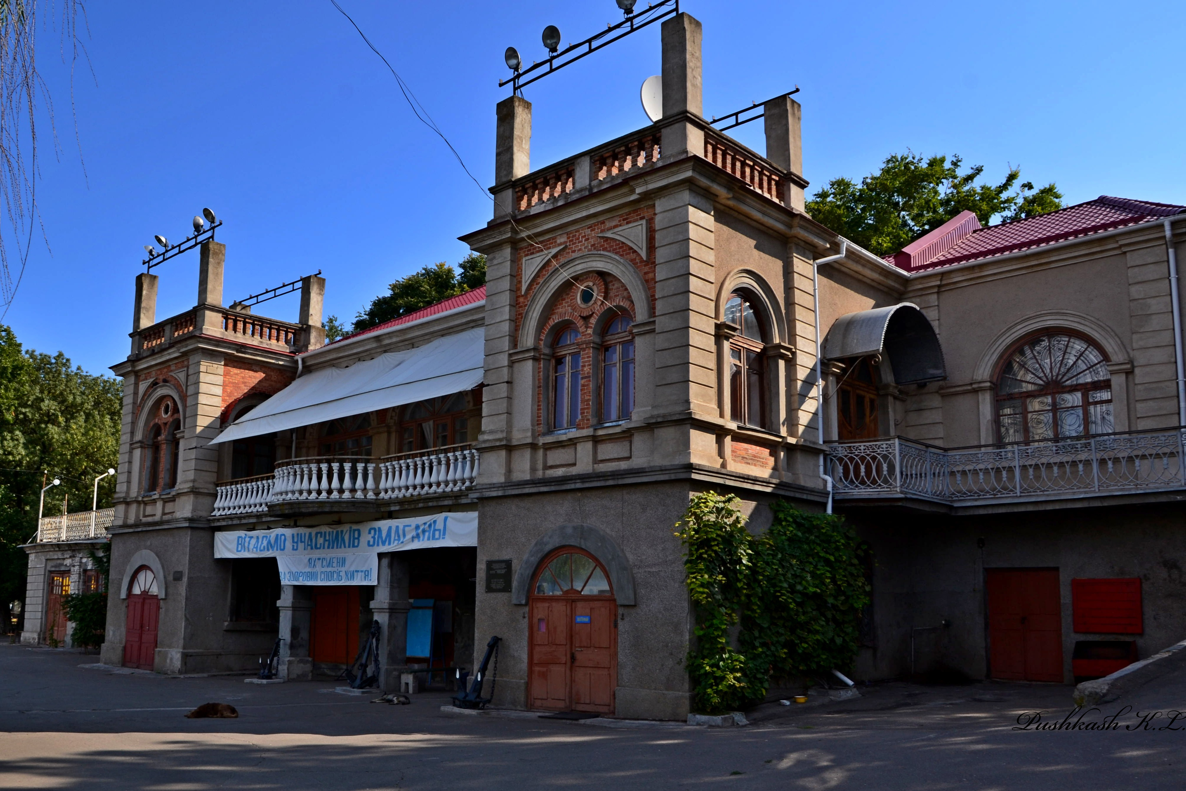 Річковий яхт-клуб, Миколаїв, вул. Спортивна, 7